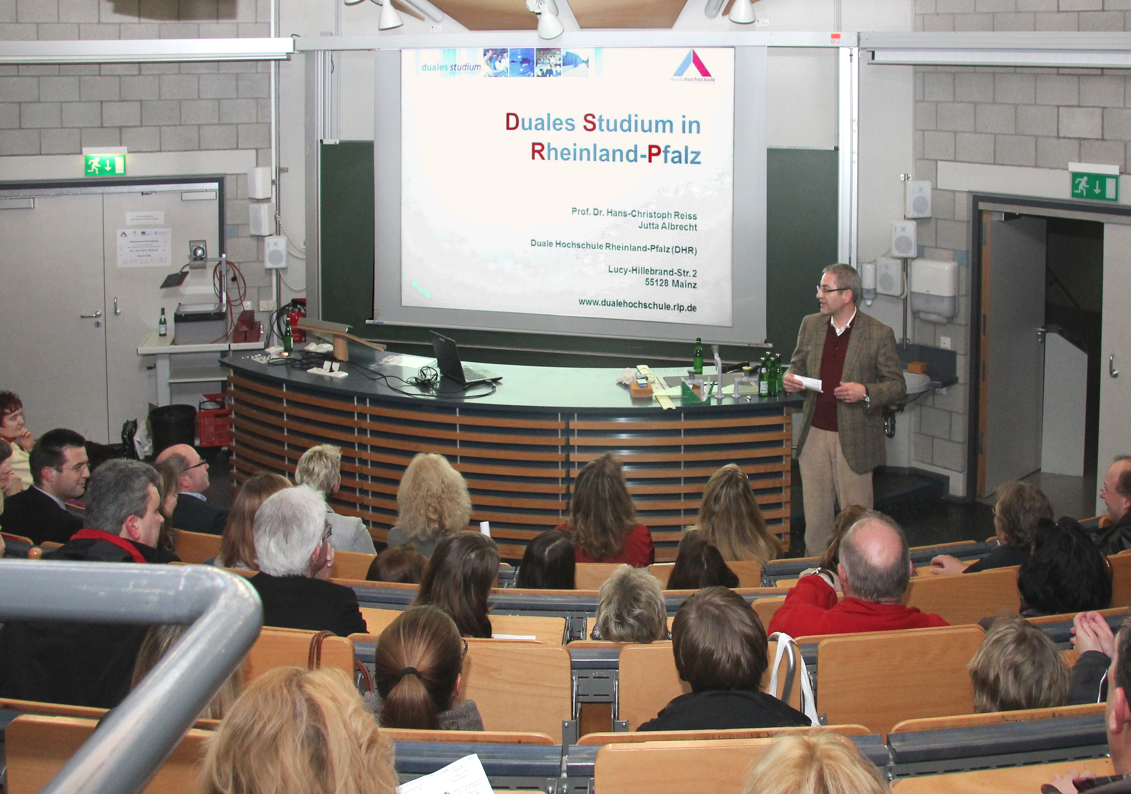 Hans Christoph Reiss bei einem Vortrag über das Duale Studium, Veranstaltung in der Hochschule Koblenz in Zusammenarbeit mit der Dr. Zimmermannschen Wirtschaftsschule